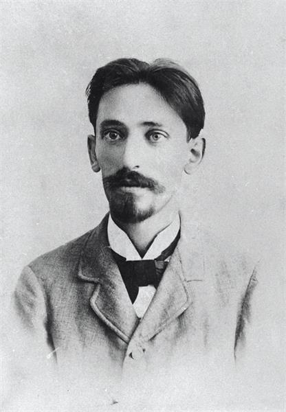 ויטקין